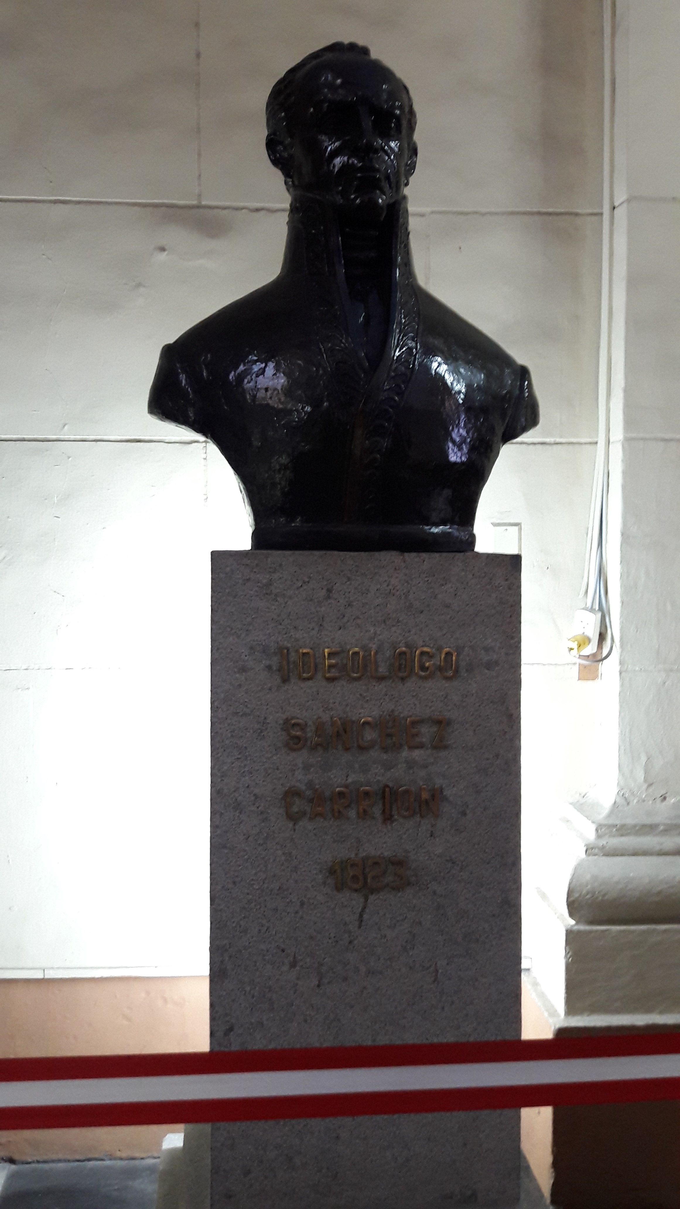 Ideologo Sanchez Carrion 1823